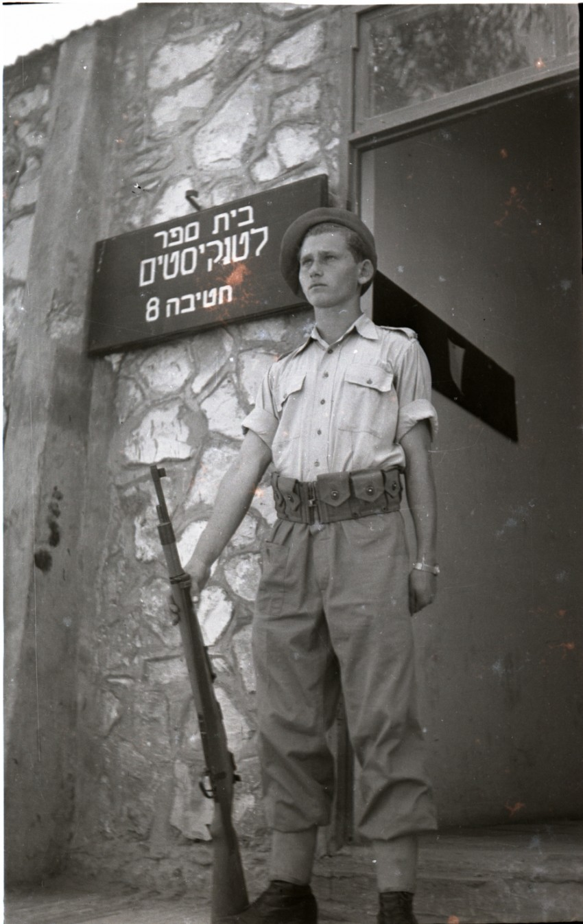 בית ספר לטנקיסטים חטיבה 8